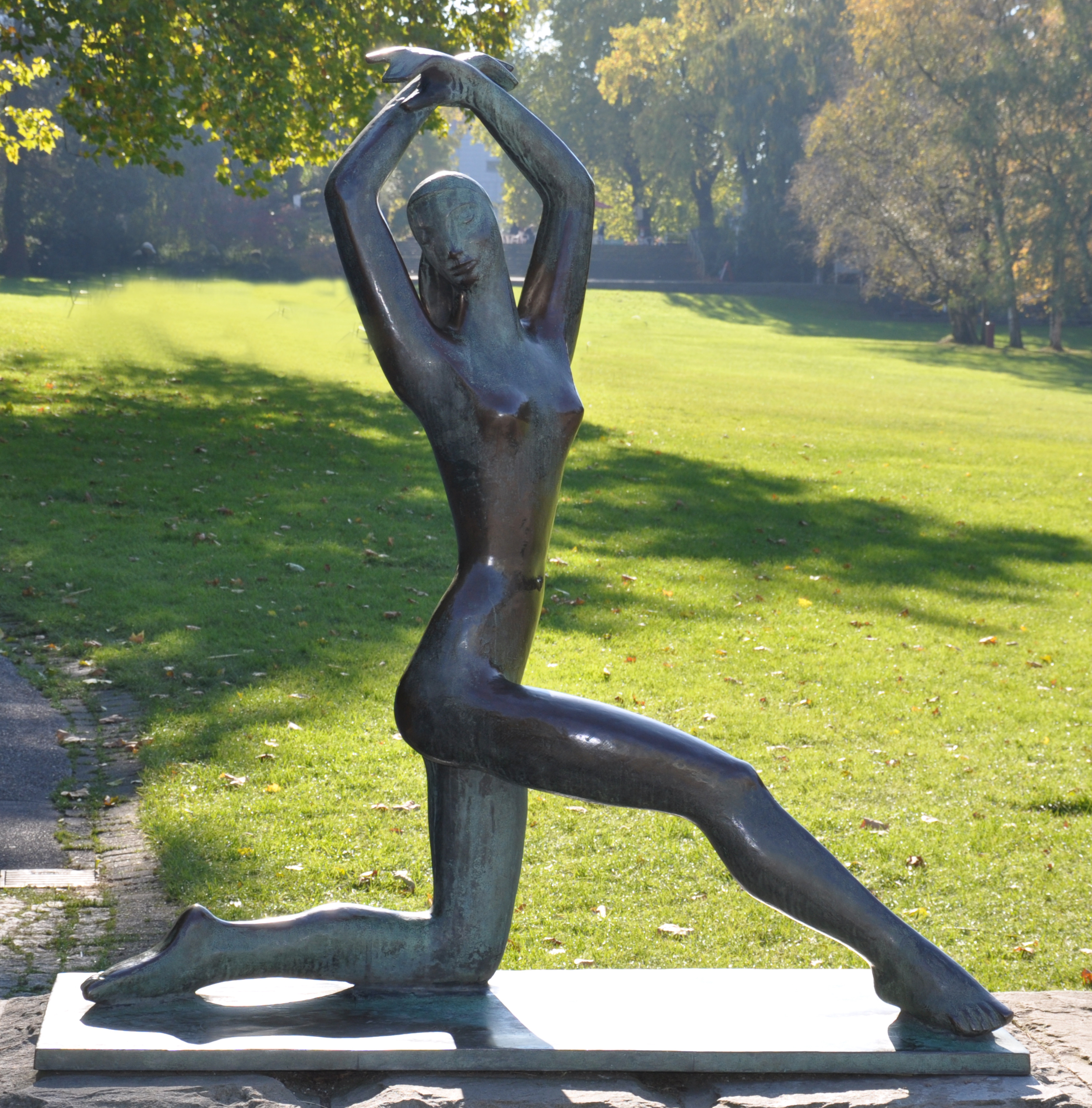 skulptur in der gruga essen. von lemke, walter e., 1953